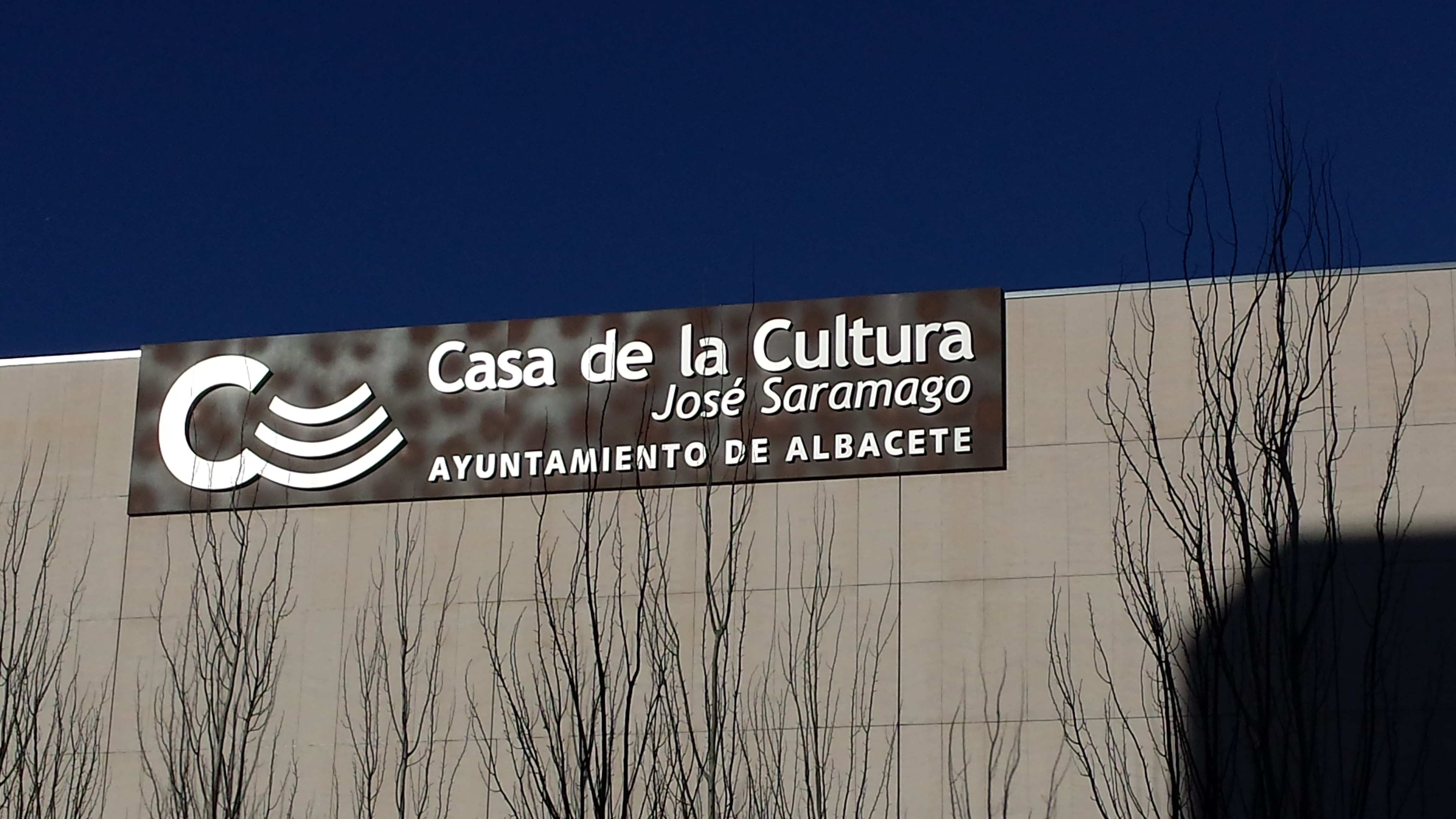 UP Albacete